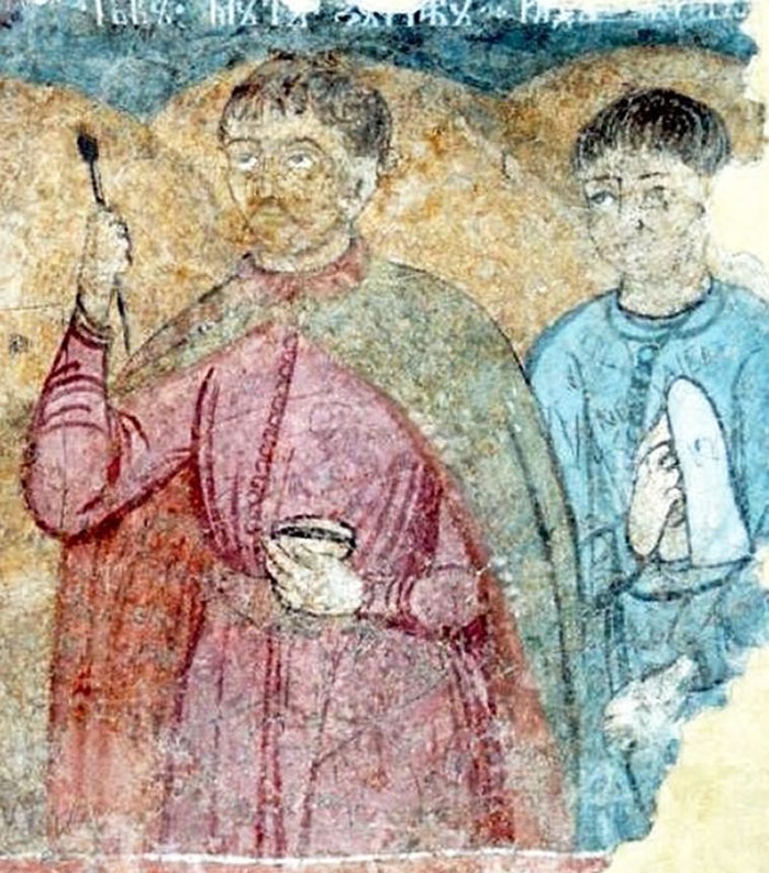 PÂRVU MUTU (1657-1735), autoportret.